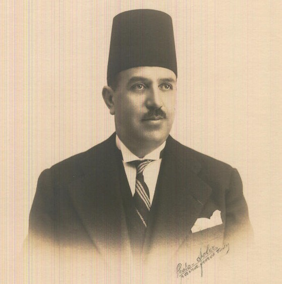 Former Tunisian PM Tahar Ben Ammar